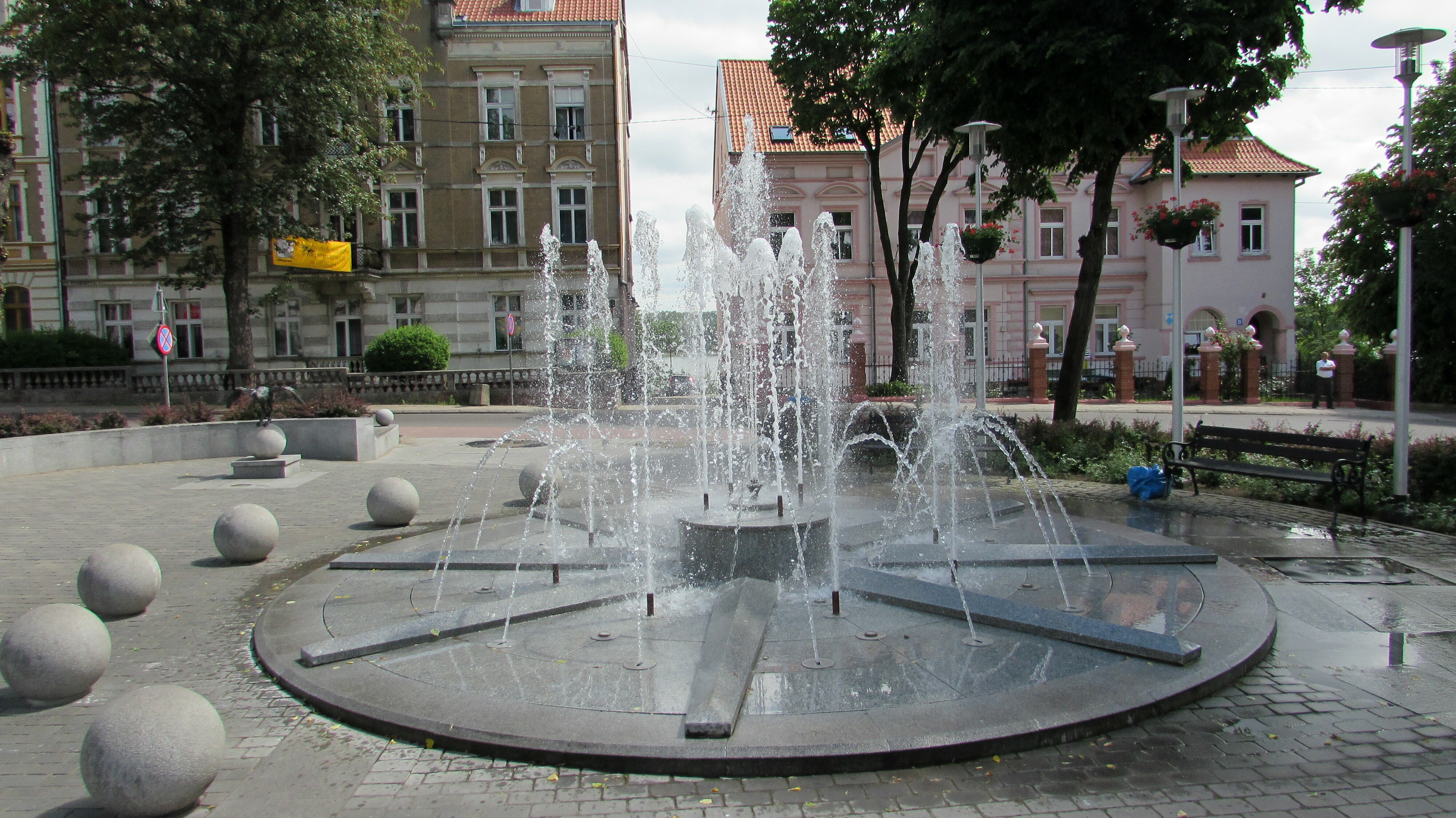 MragowoBrunnen